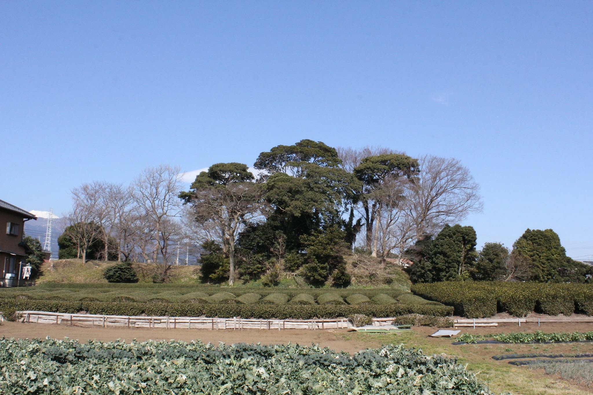 沼津 長塚古墳